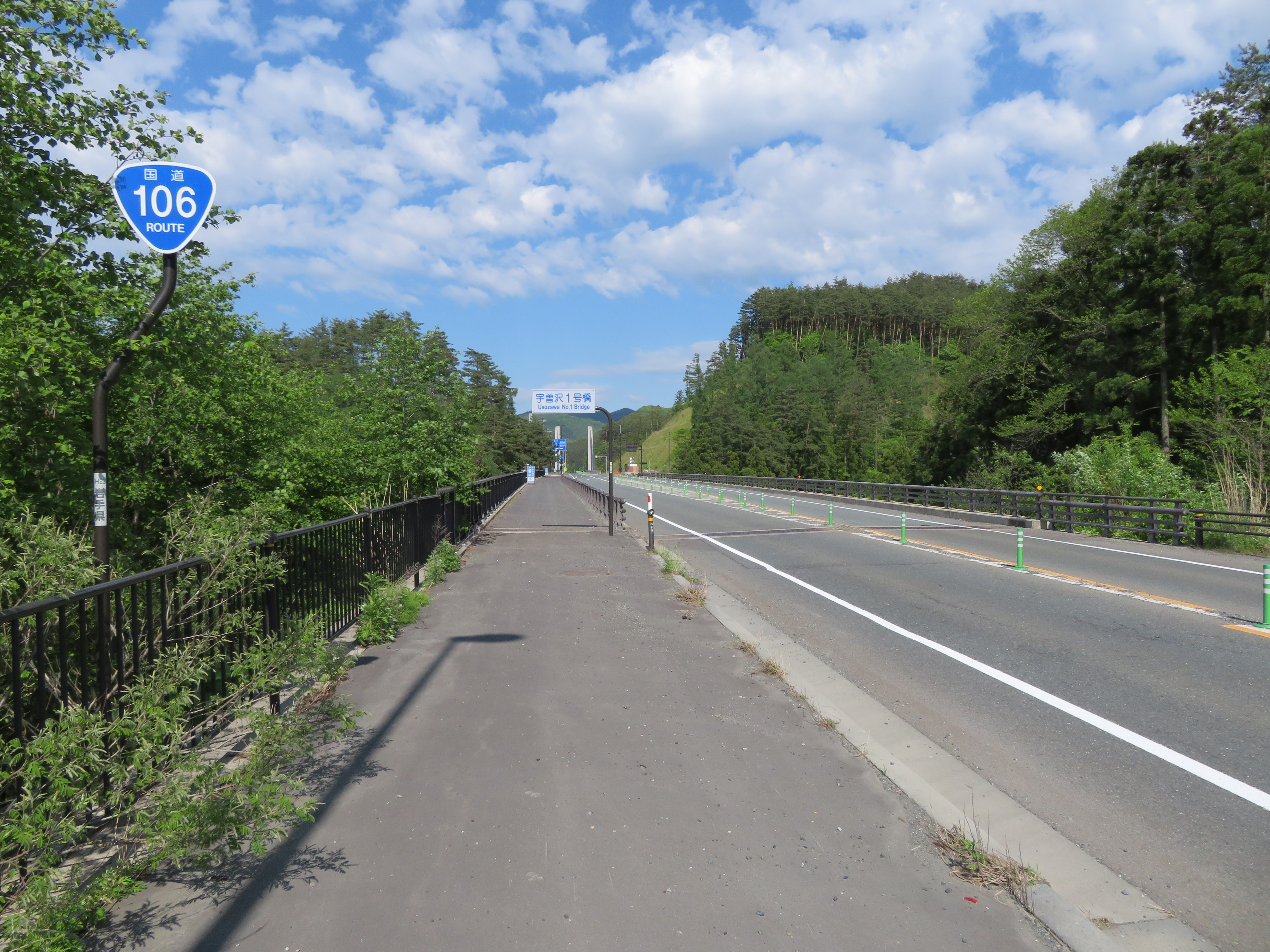 国道106号線梁川道路 岩手県盛岡市川目第１地割付近（区界方面を撮影） Canon PowerShot SX720 HS